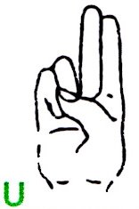 Der Buchstabe U im deutschen Fingeralphabet, entsprechend einer Infokarte des Landesverbandes Bayern der Gehörlosen e.V. (